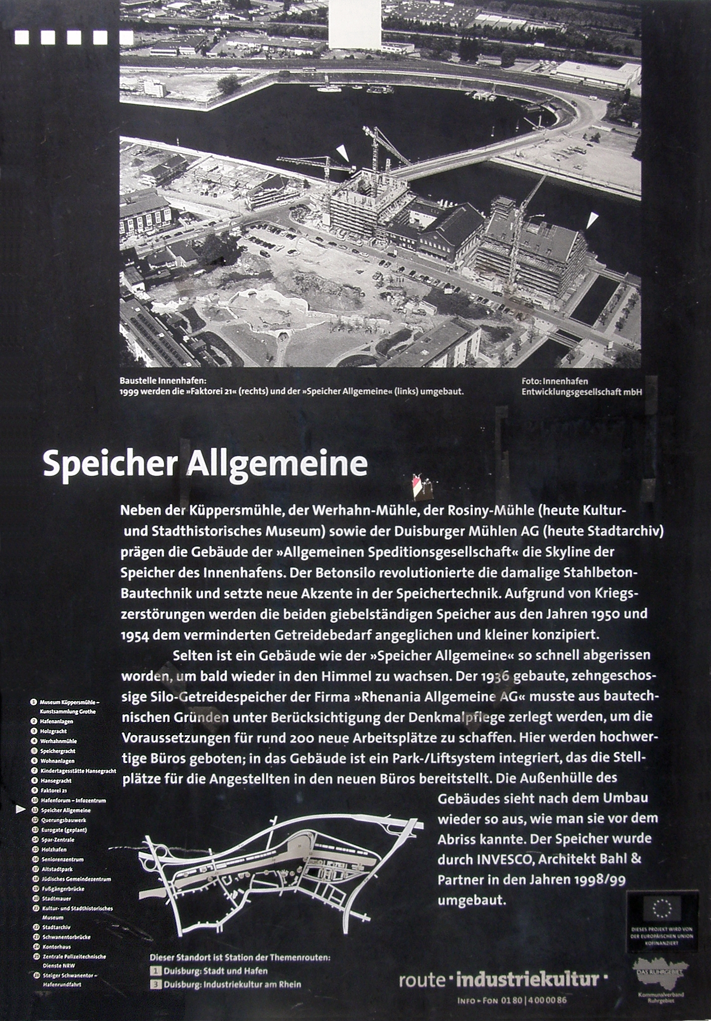 Infotafel der Route der Industriekultur zum Speicher Allgemeine im Innenhafen von Duisburg